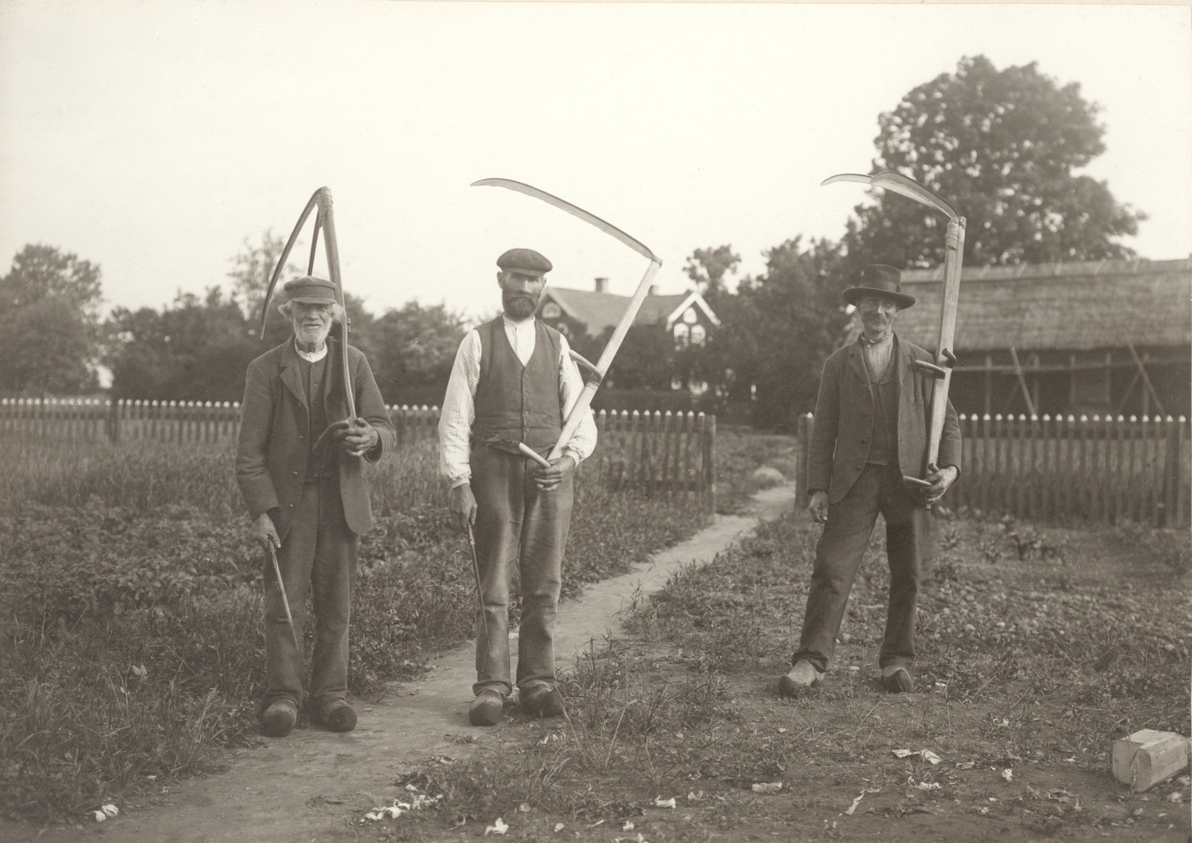 Slåtter, män med liar. Småland, Södra Möre hd, Torsås sn. ”Slotterkarlar vid ’Toras’ i Slätafly, Torsås socken”. Foto d. 5 Juli 1904.